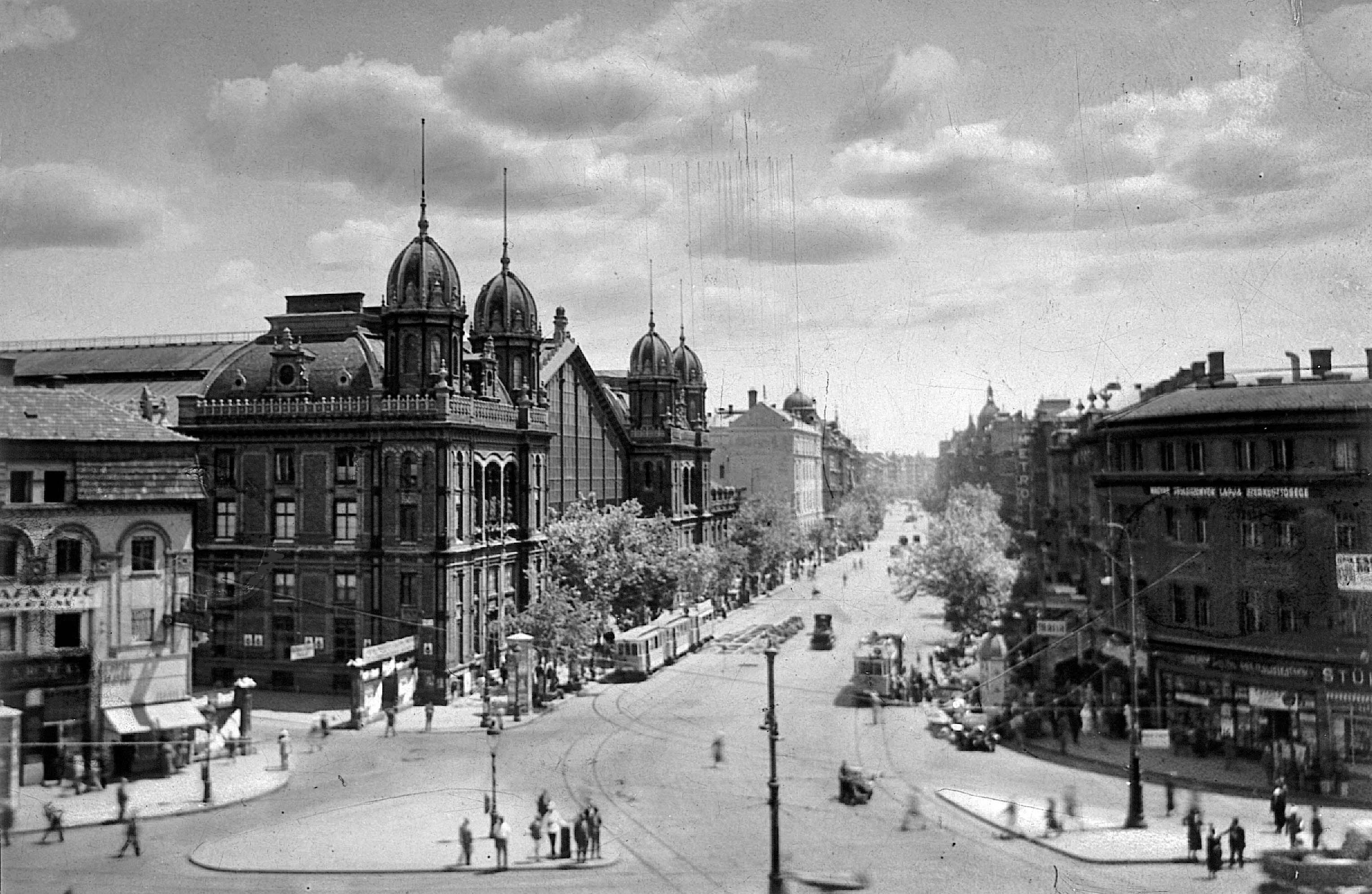 Nyugati pályaudvar és környéke, valamint a Nagykörút képeslapon 1935-ben, Budapest (60 x 90 mm), Barasits János kiadása